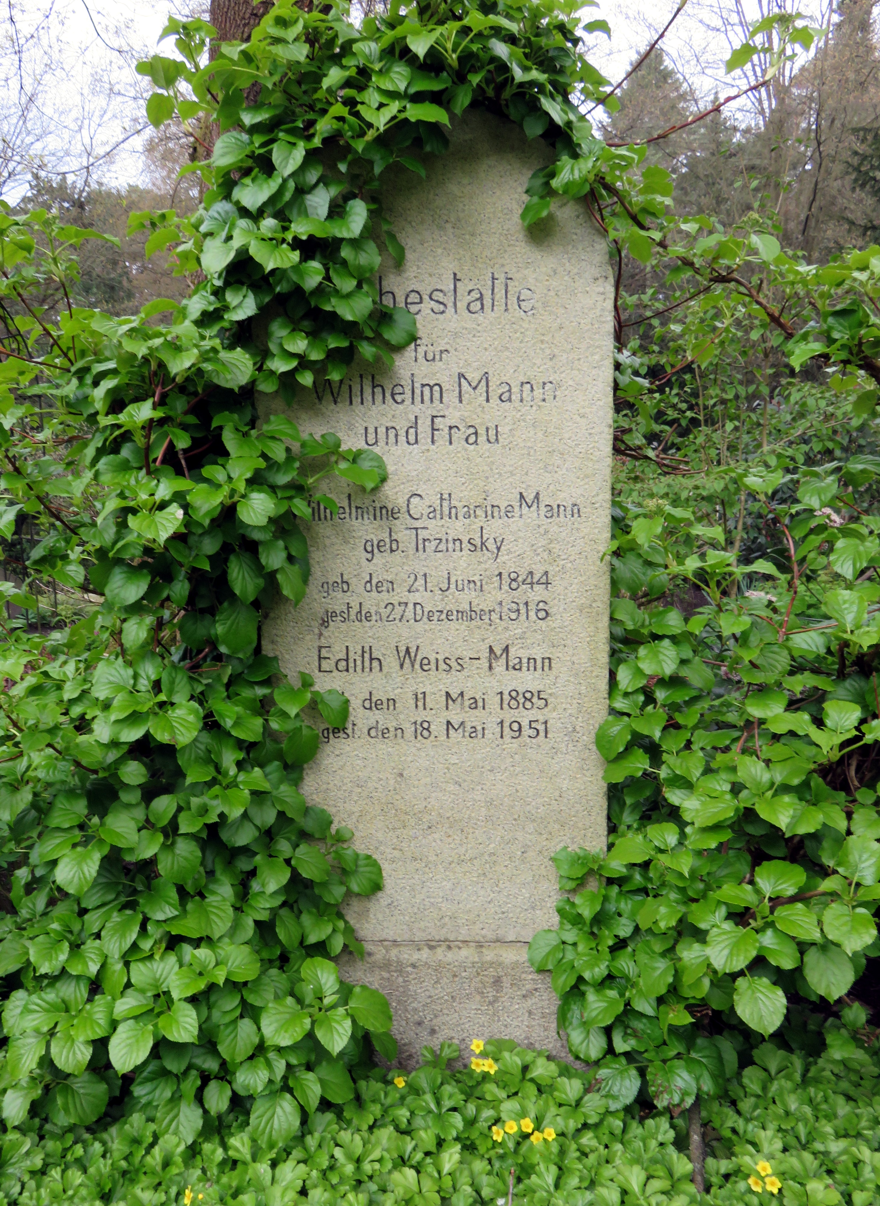 Historischer Grabstein der deutschen Pianistin Edith Weiss-Mann im Bereich des Gartens der Frauen auf dem Ohlsdorfer Friedhof in Hamburg-Ohlsdorf.